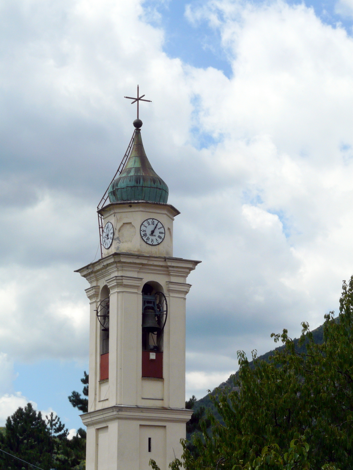 Il campanile della chiesa di San Michele Arcangelo, Carpeneto, Fascia, Liguria, Italia